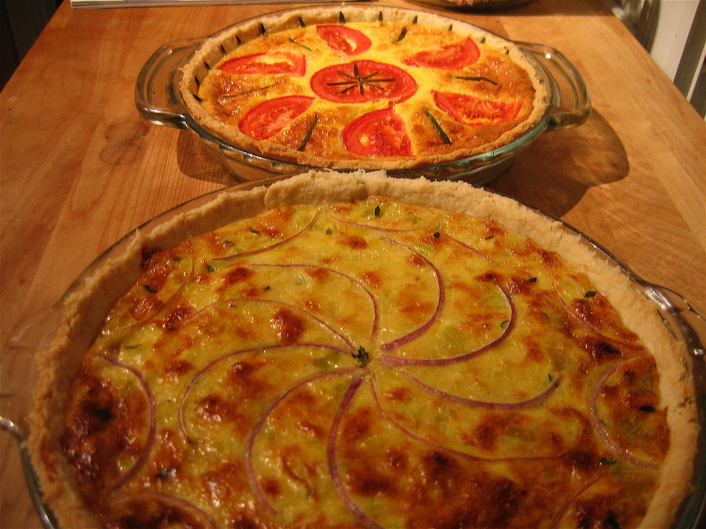 Brunch Quiche